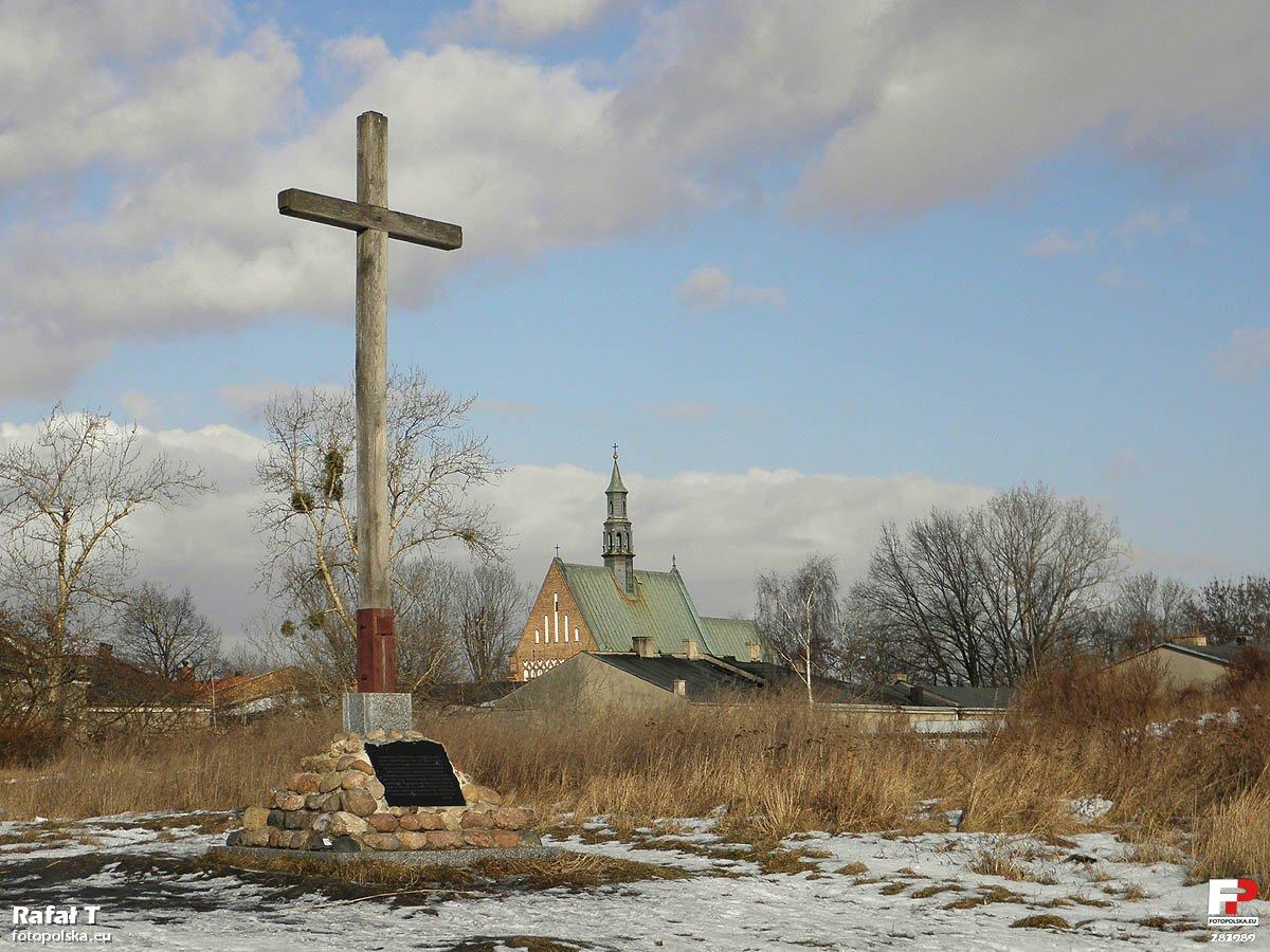 Krzyż na szczycie grodziska upamiętniający istniejący tu w latach 1790-1812 cmentarz, w tle kościół św. Wacława.